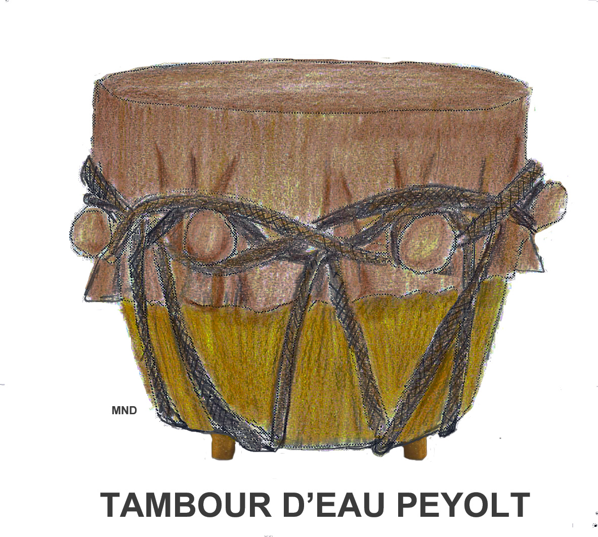 Tambour d'eau de la Native American Church, (Peyote drum)